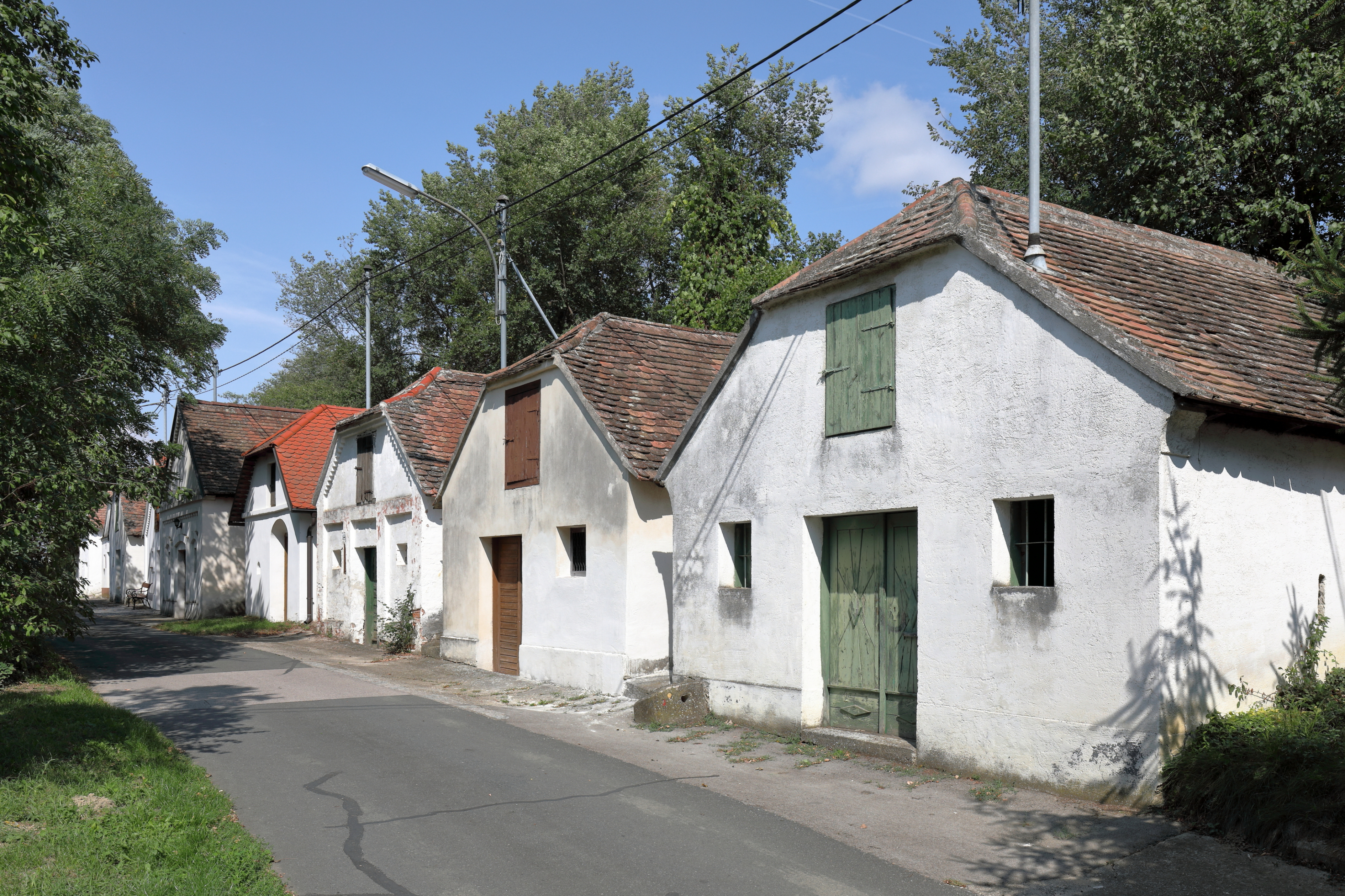 Die Kellergasse „Bergzeile“ in der niederösterreichischen Gemeinde Gaubitsch.Das Kellergassensystem befindet sich im östlichen Hintaus und besteht aus zwei am Hang hintereinander liegenden jeweils einseitigen Kellergassenreihen. Auf insgesamt 700 Metern Länge befinden sich 69 Keller, mehrheitlich giebelständig.